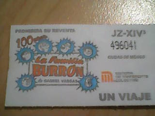 Boleto para el Metro de la Ciudad de México en el que se conmemora el centenario del natalicio de Gabriel Vargas, creador de La Familia Burrón.